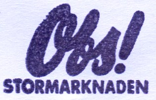 Kooperativa Förbundets logo för rabattvaruhus